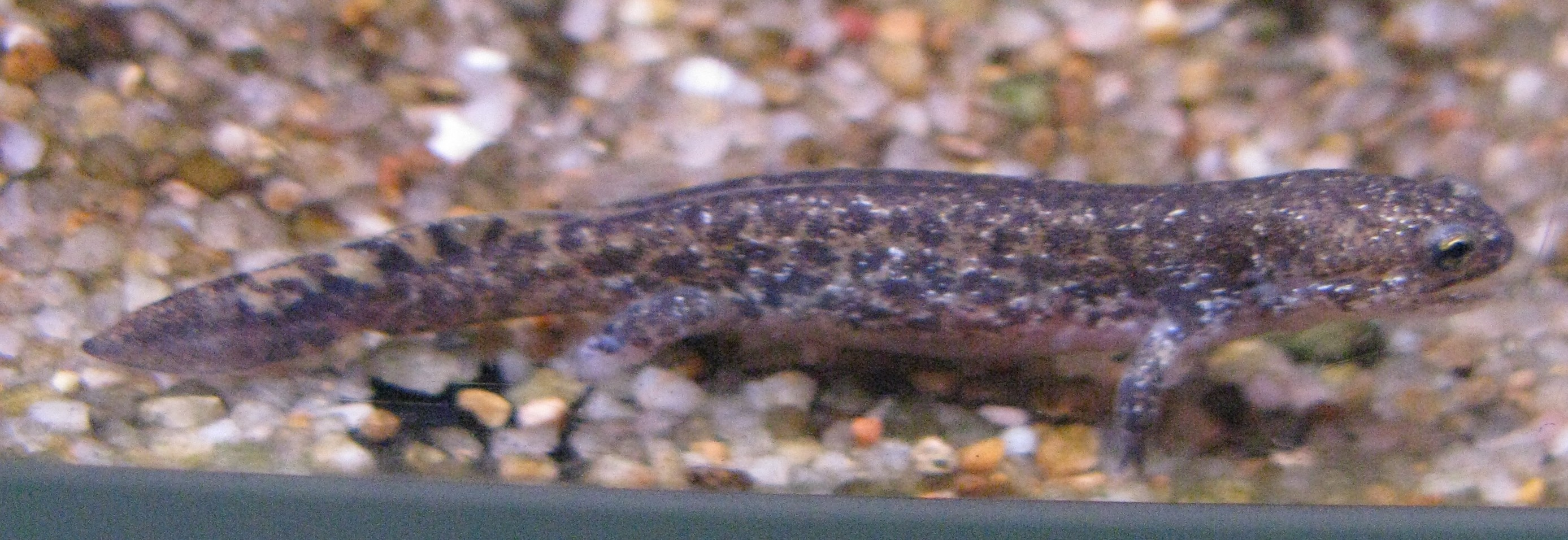 Scientific name Hynobius nebulosus